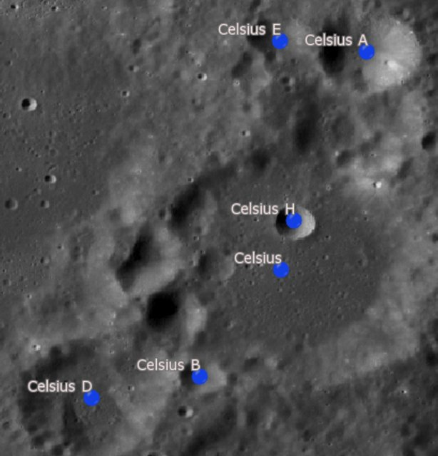 Cráter Celsius (LROC WAC-Lola)